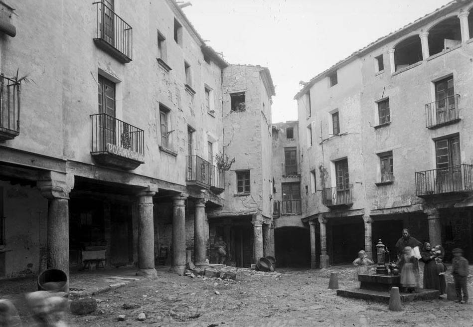 Imatge